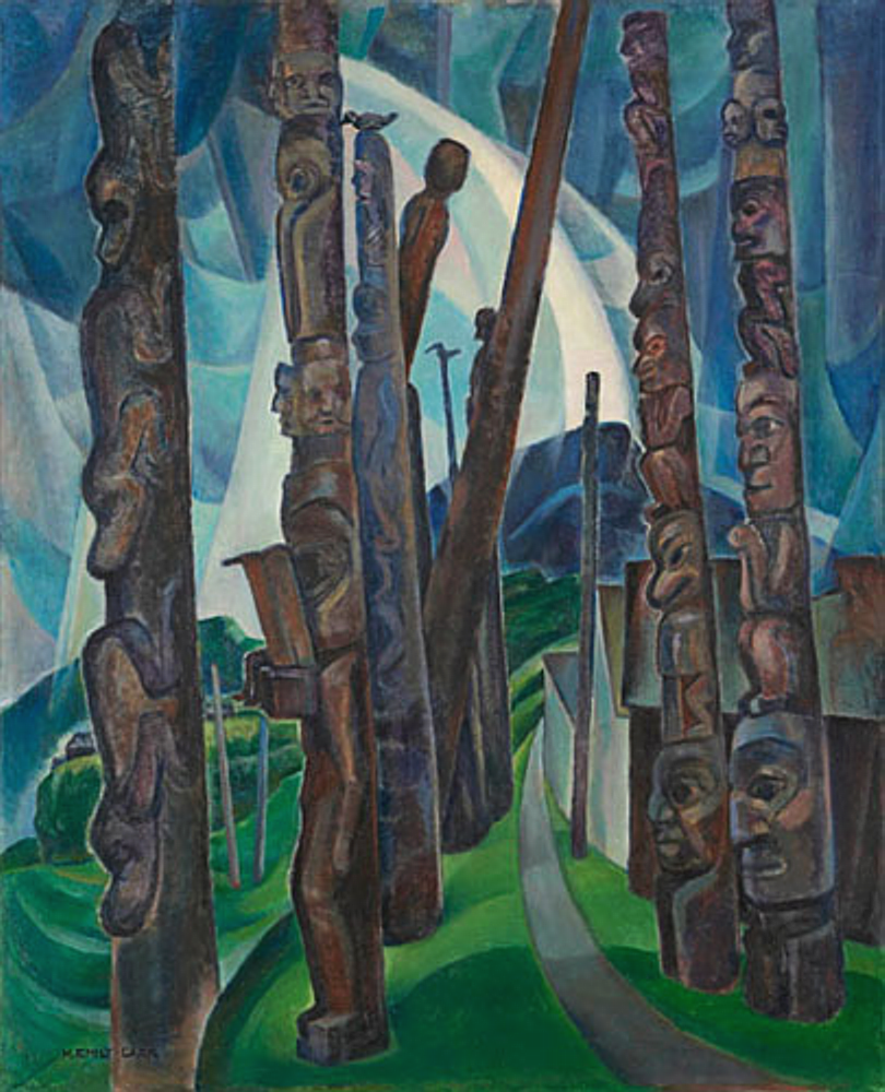 Kitwancool